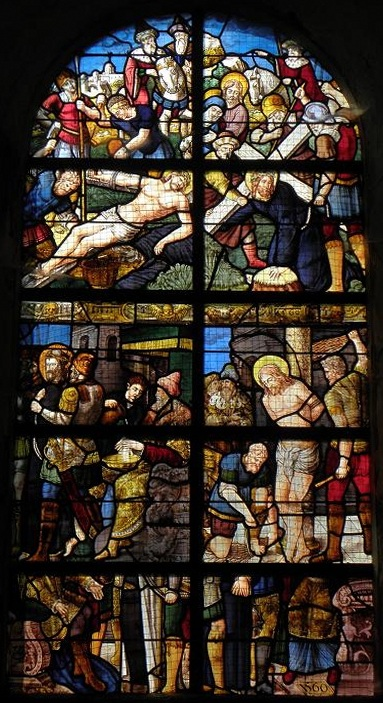 Vitrail de la Passion de l'église Saint-Martin de Moulins (35).